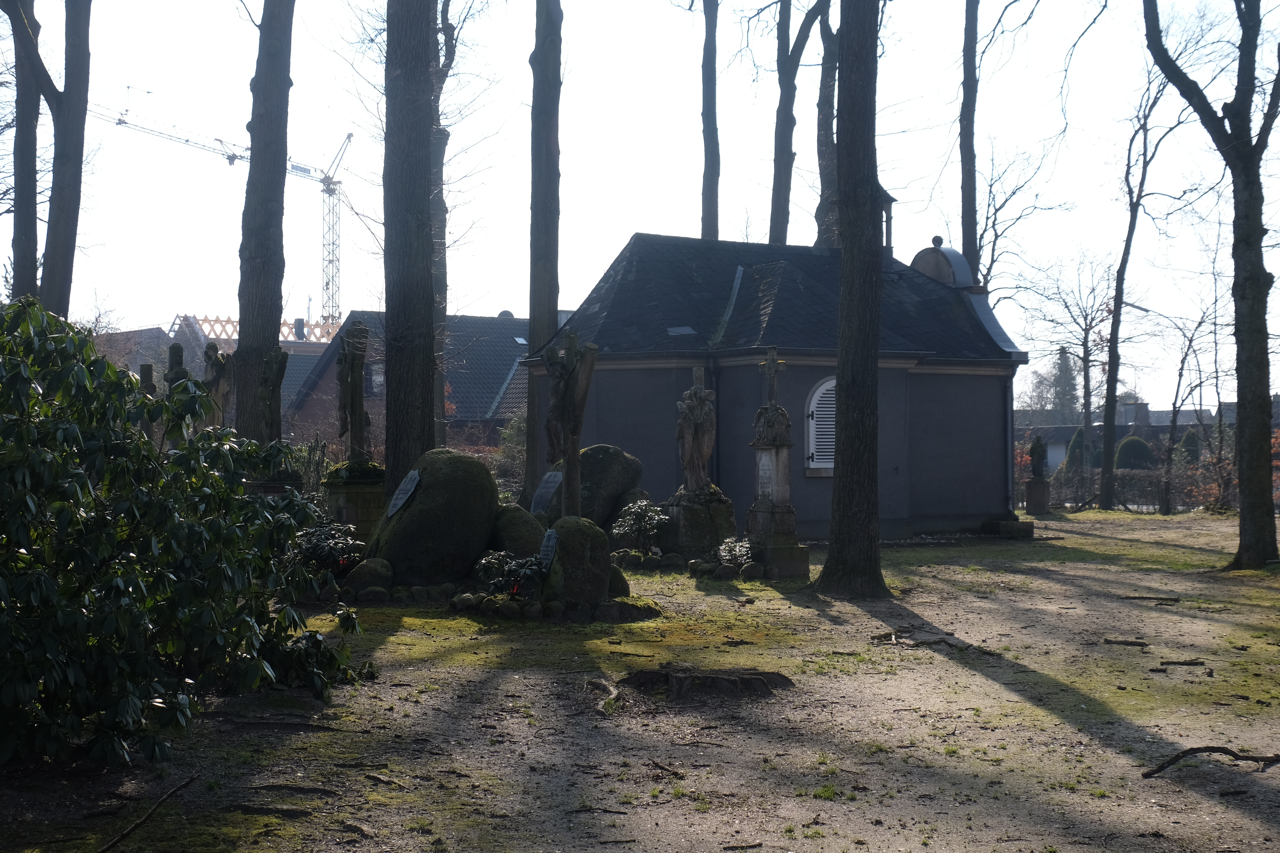 Rundgang über die Loburg 2018